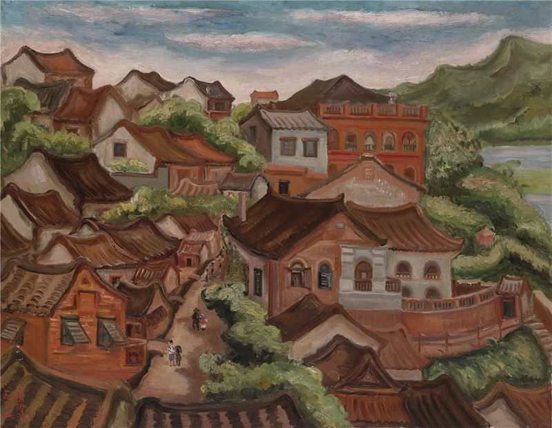 收藏於國立臺灣美術館的國家重要古物 陳澄波〈淡水〉